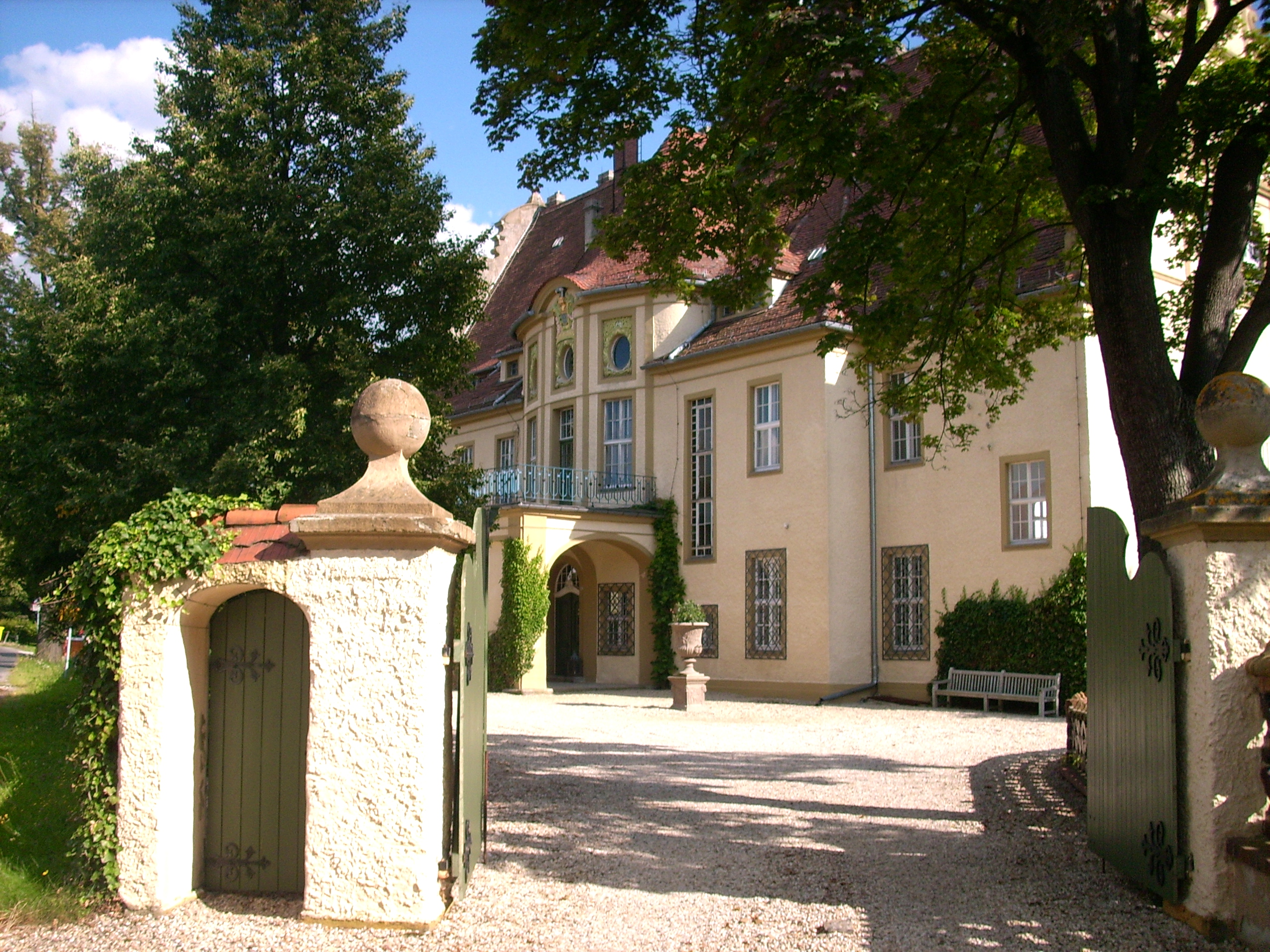 Einfahrt des Schlosses in Weißig, Ortsteil von Oßling Hornjoserbsce: Zajězd Wysočanskeho hrodu w gmejnje Wóslink